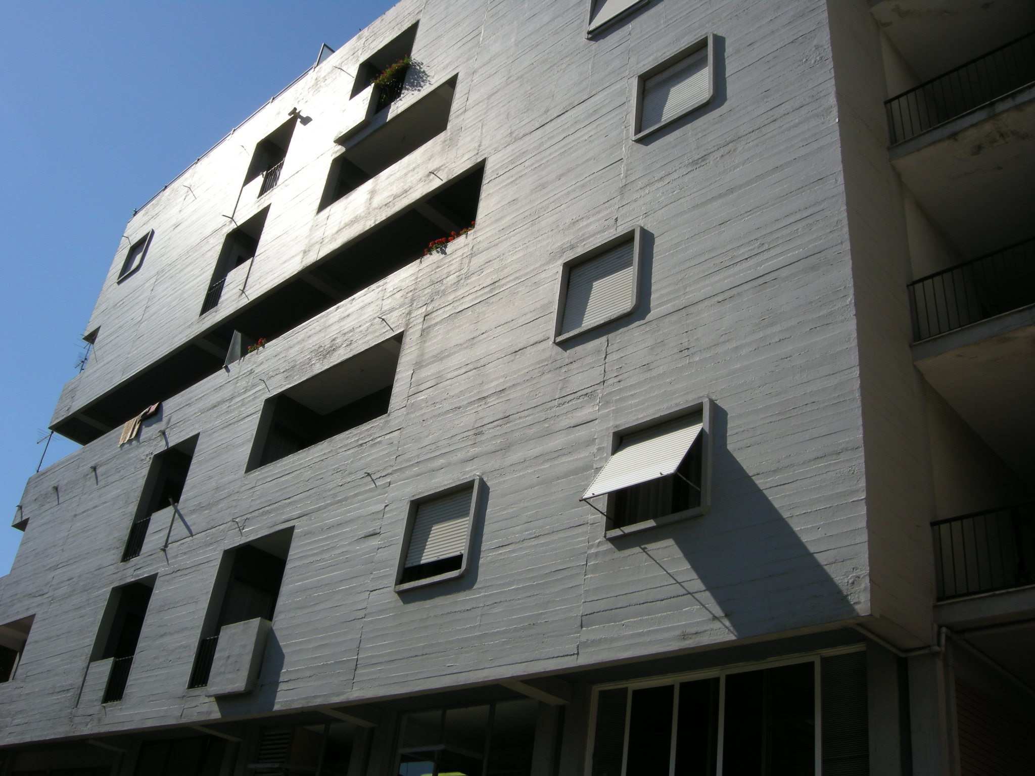 Condominio di via Venezia — Marina di Carrara, Tuscany.